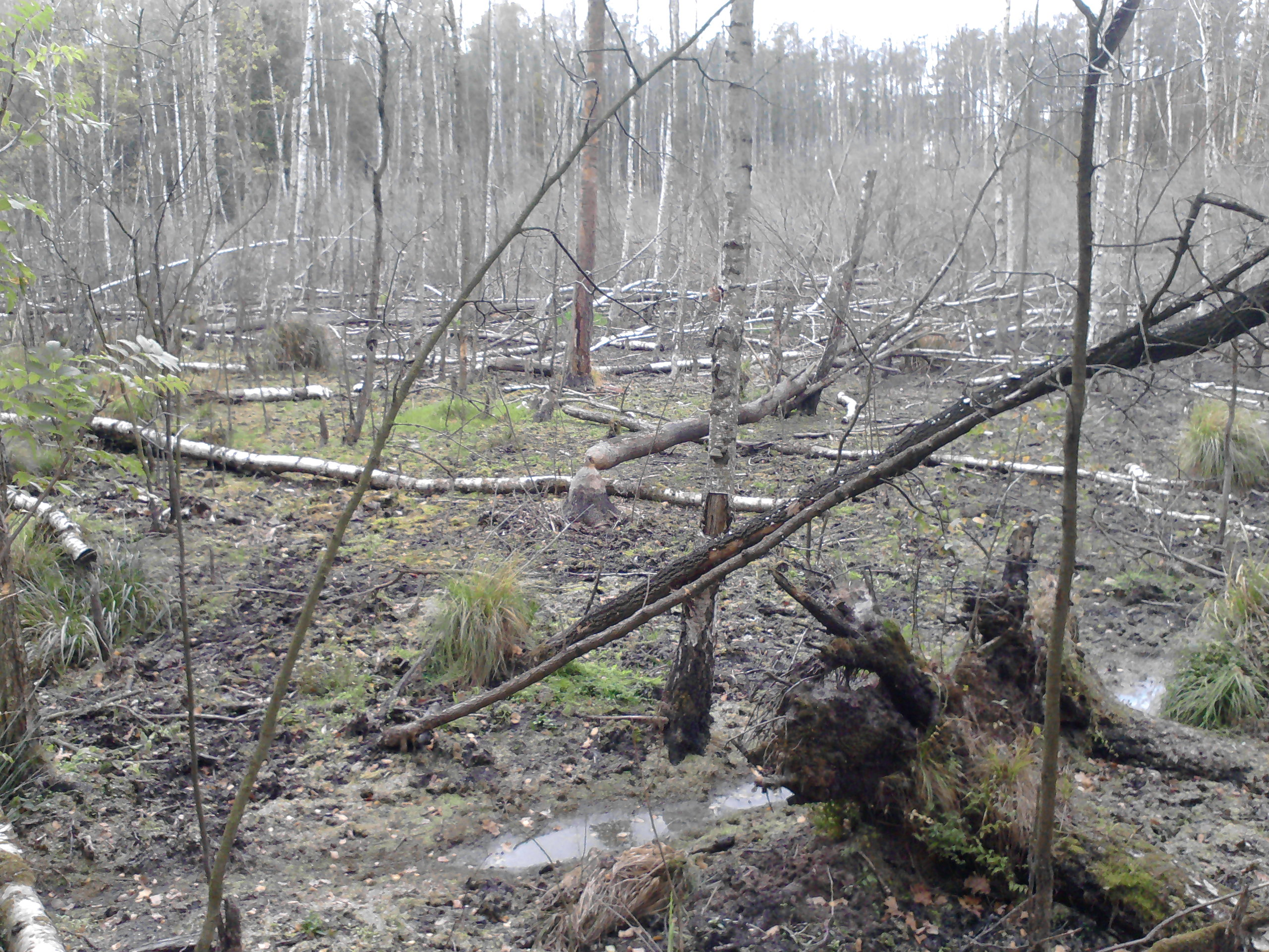 Żerowisko bobrów w gminie Moszczenica, powiat piotrkowski